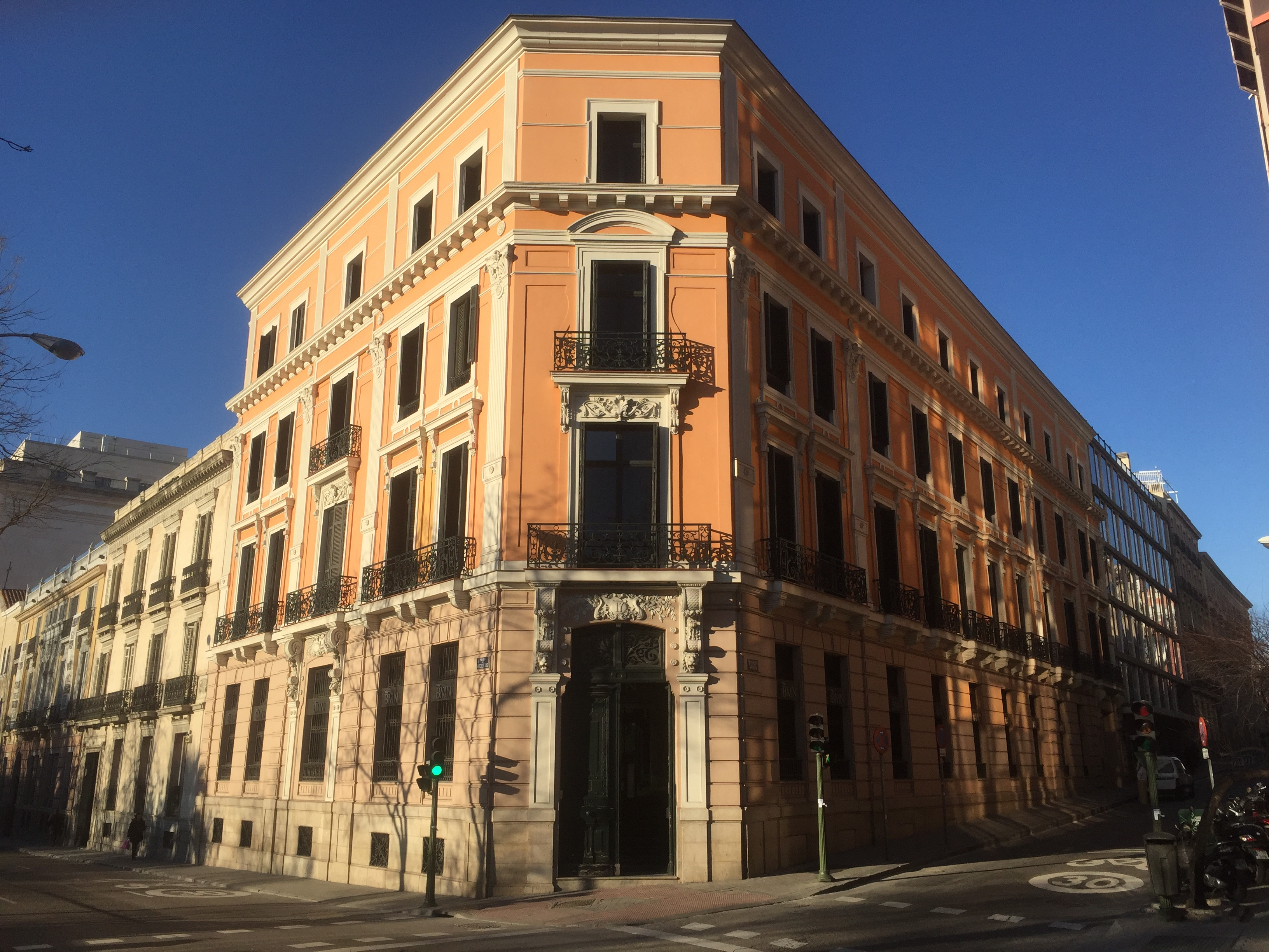 Edificio de la Sociedad de Crédito Mobiliario